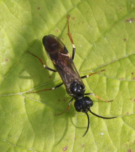 Weißgegürtelte Rosenblattwespe (Allantus cinctus) am 16. August 2019 in Walldorf/Baden